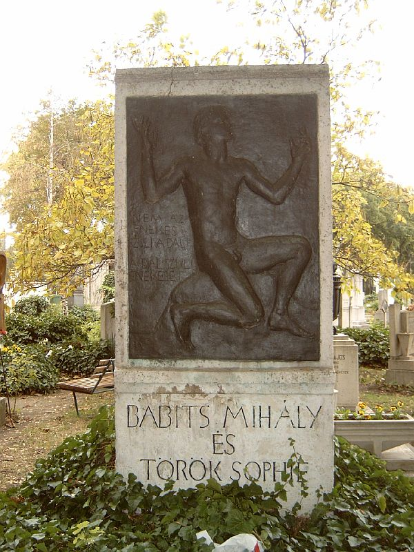 Babits Mihály és feleségének, Török Sophie-nak (azaz Tanner Ilonának) sírja Budapesten. Ferenczy Béni (1890–1967) alkotása. Kerepesi temető: 34-1-30.